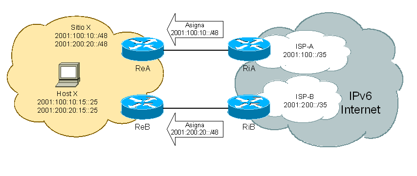 Figura usada en el artículo Multihoming Autor: Usuario:Barcex Licencia: GFDL y cc-by-sa-2.5